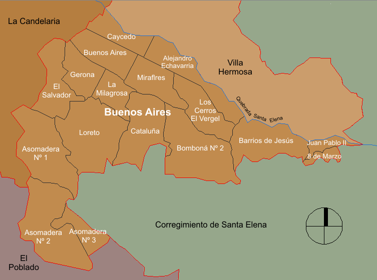 mapa de la división barrial de la comuna Buenos Aires. Medellín, Colombia.